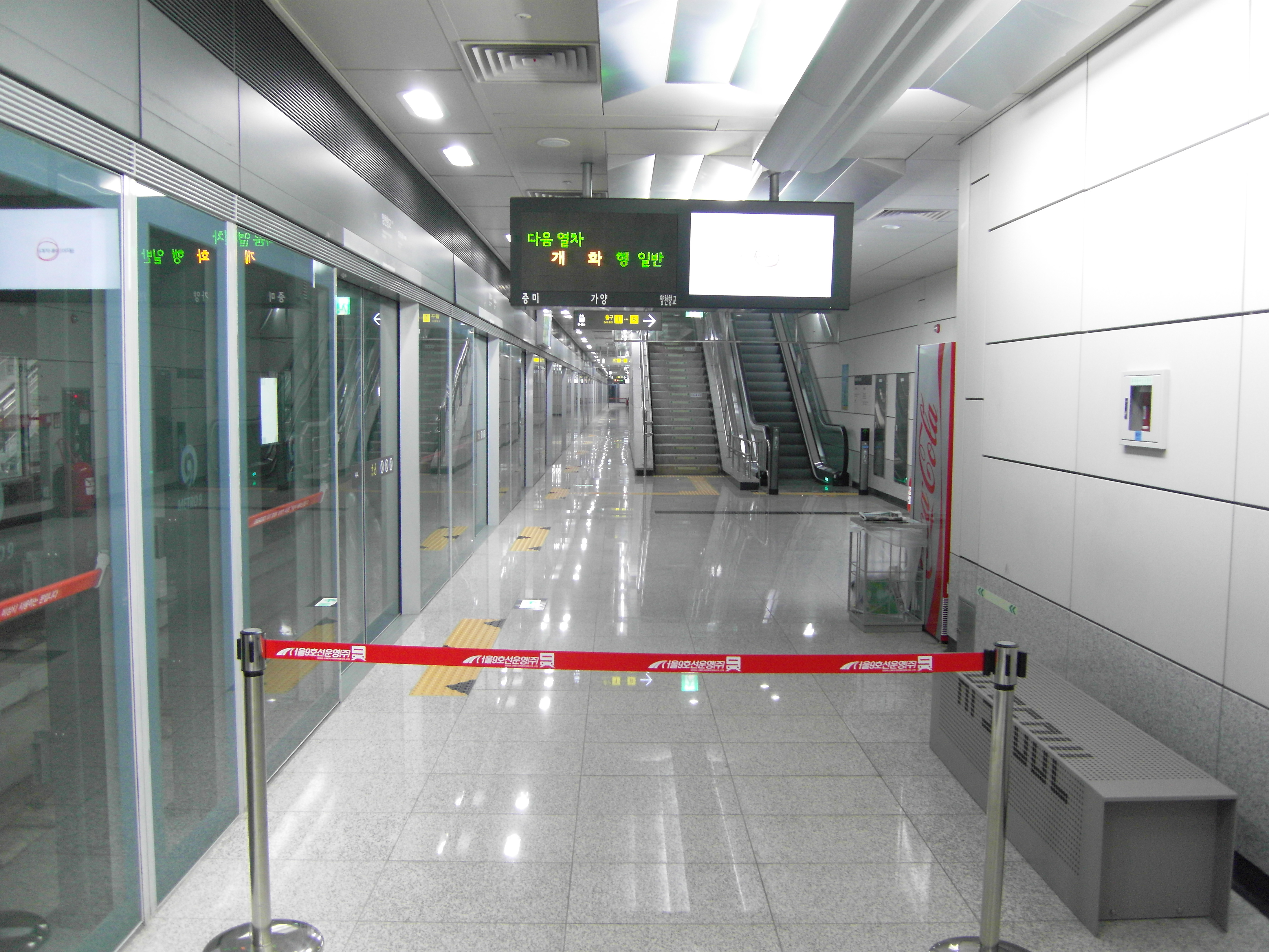 ソウル地下鉄9号線陽川郷校駅 ホーム